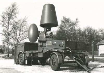 Een HSA L4/5 vuurleidingsradar in stelling bij de lessen Batterijdienst van de Luchtdoelartillerieschool te Ede. Aan deze radar konden drie vuurmonden 40L70 worden gekoppeld.